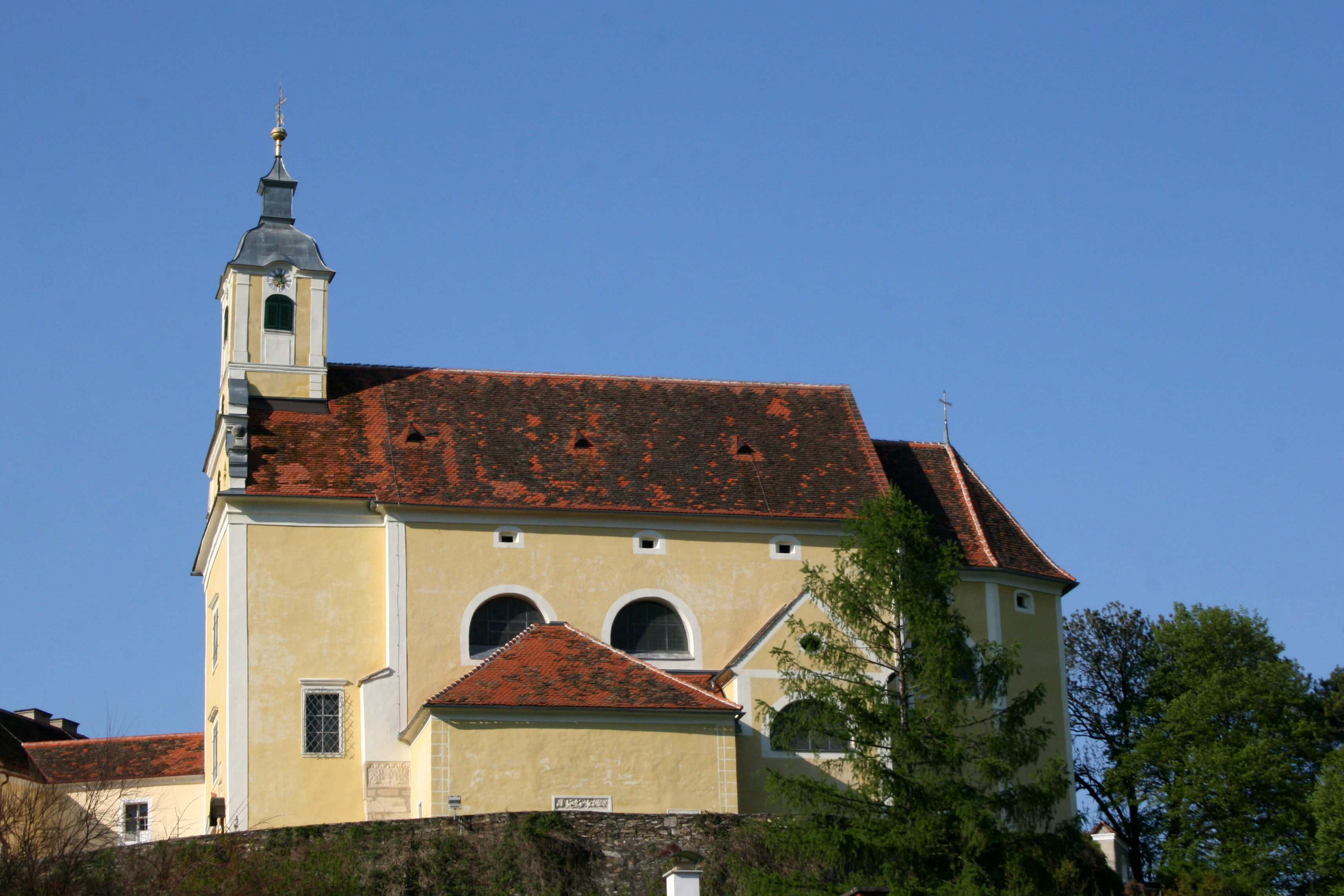 Kath. Pfarrkirche hl. Johannes der Täufer